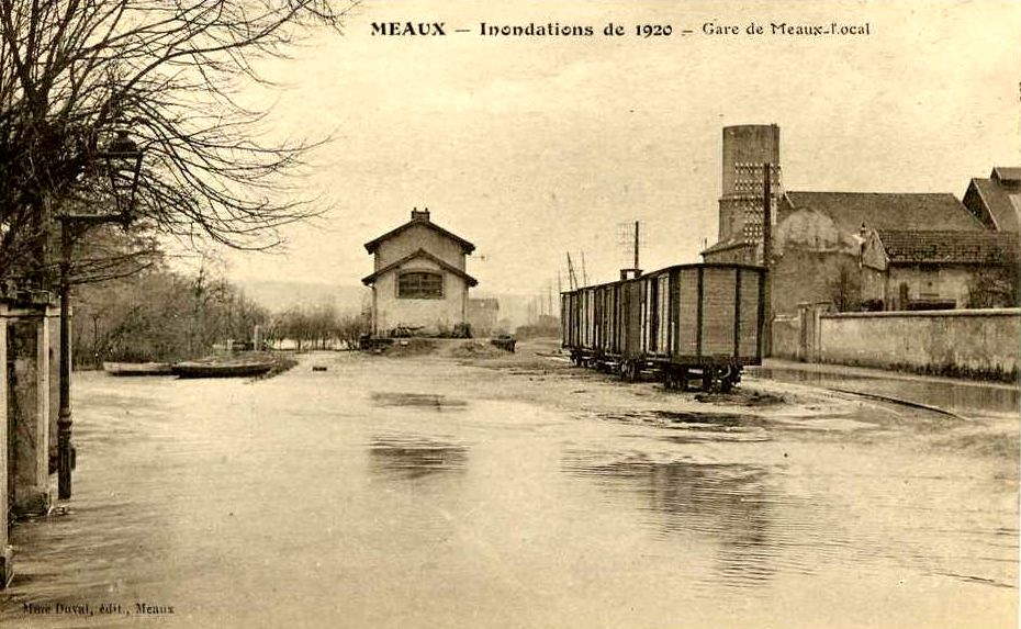 La gare de Meaux-Local du tramway de Meaux à Dammartin (à l'est de l'actuelle gare routière) pendant les inondations de printemps 1920.